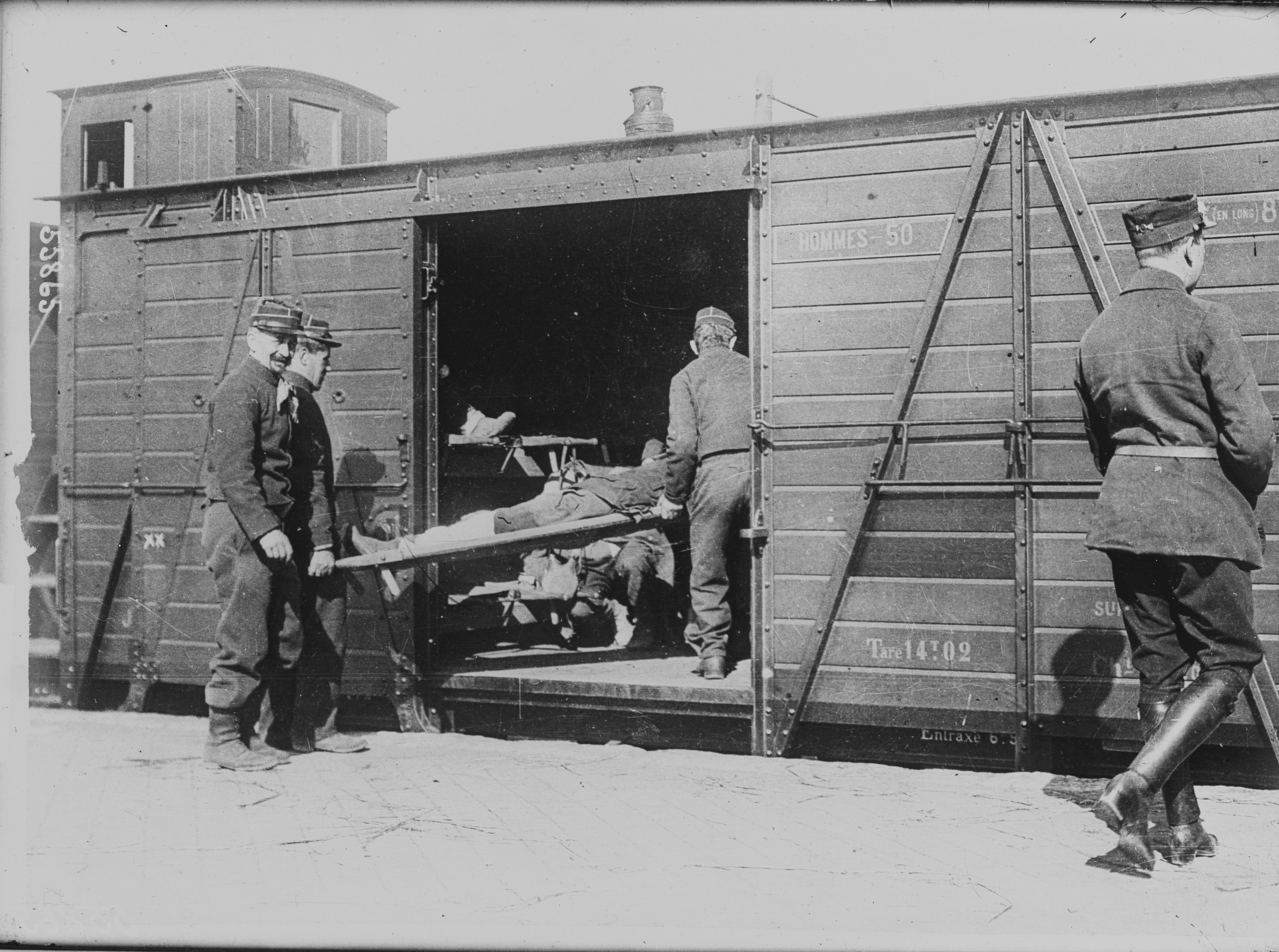 Transport d'un blessé vers le train sanitaire.